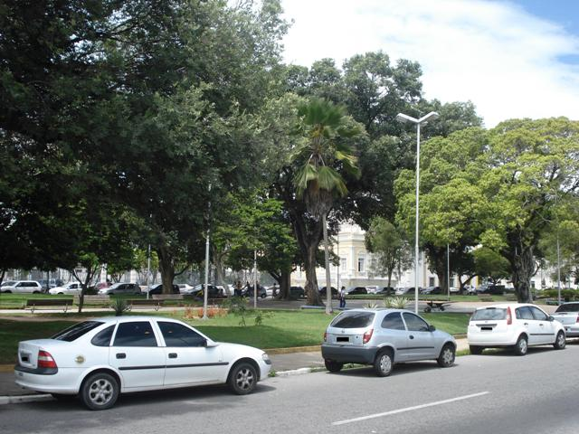 Praça André de Albuquerque em Natal, Rio Grande do Norte, Brasil.